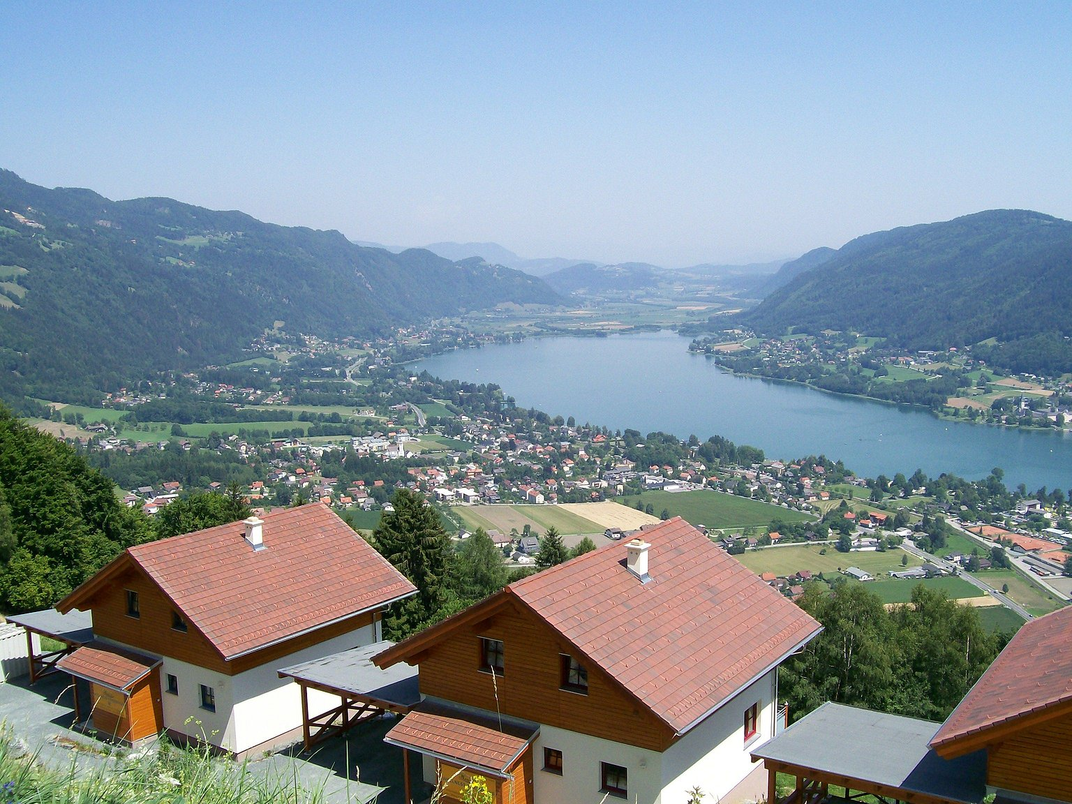 Sight from Gerlitzen Alpenstraße on Bodensdorf and Ossiacher See